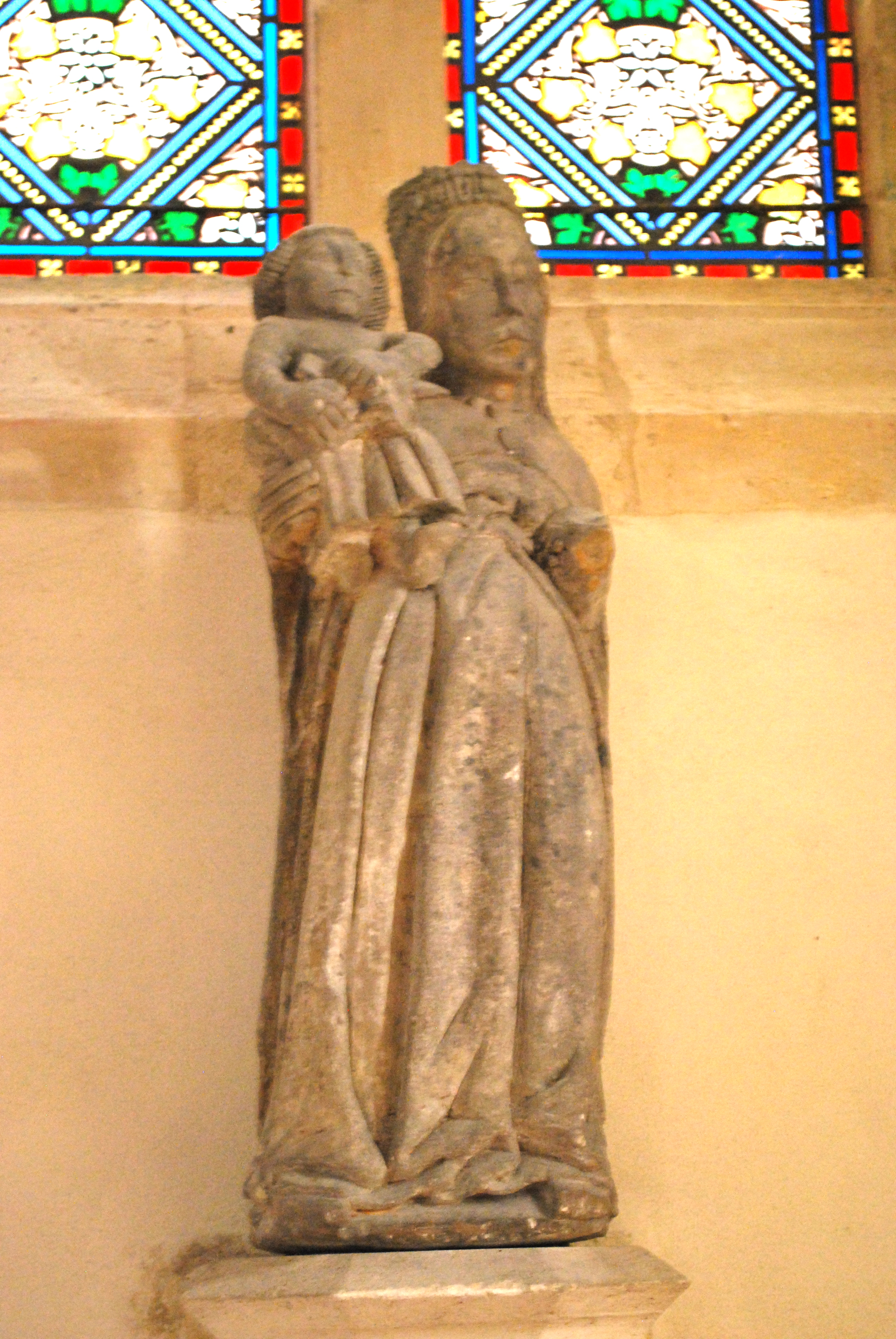 Tresses église St Pierre